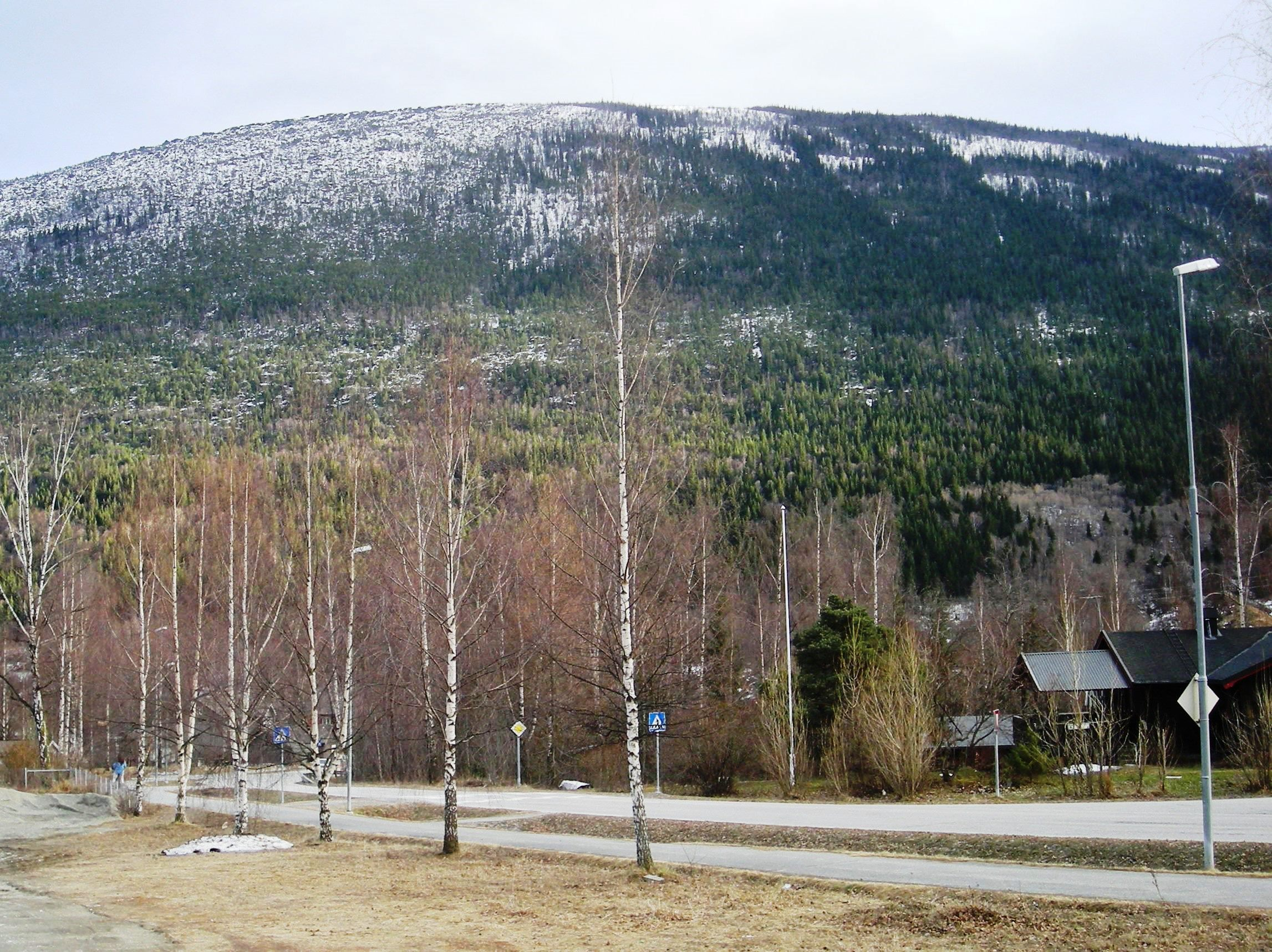 Fylkesvei 419 i Kvam i Nord-Fron, like over E6